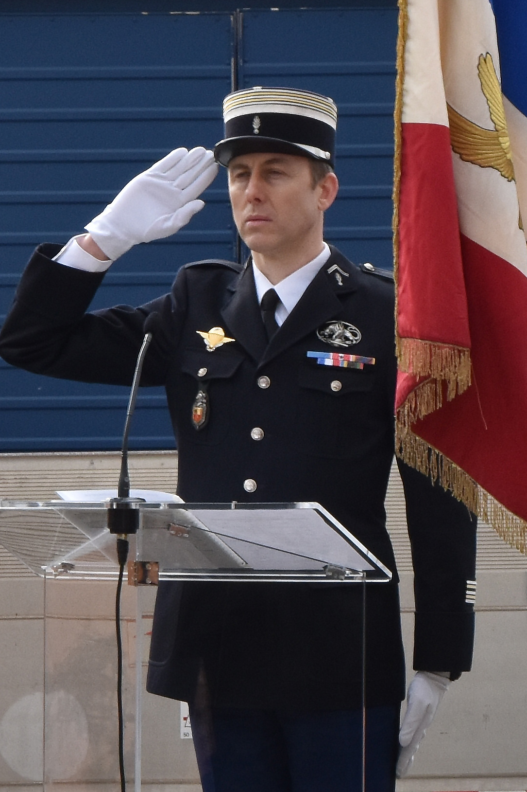 Le lieutenant-colonel Arnaud Beltrame, lors d'une cérémonie militaire dans l'Aude en février 2018.